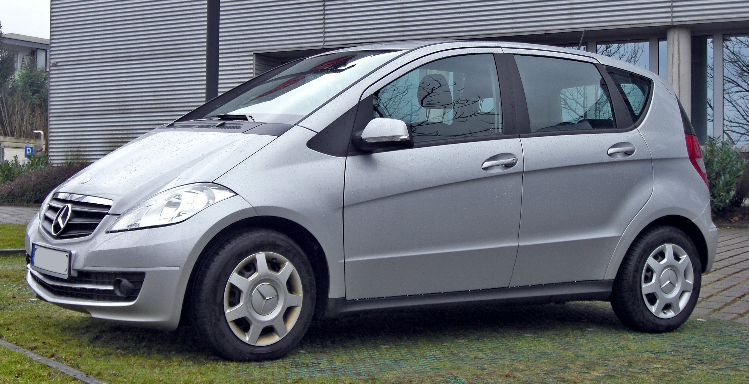 Mercedes A-Klasse